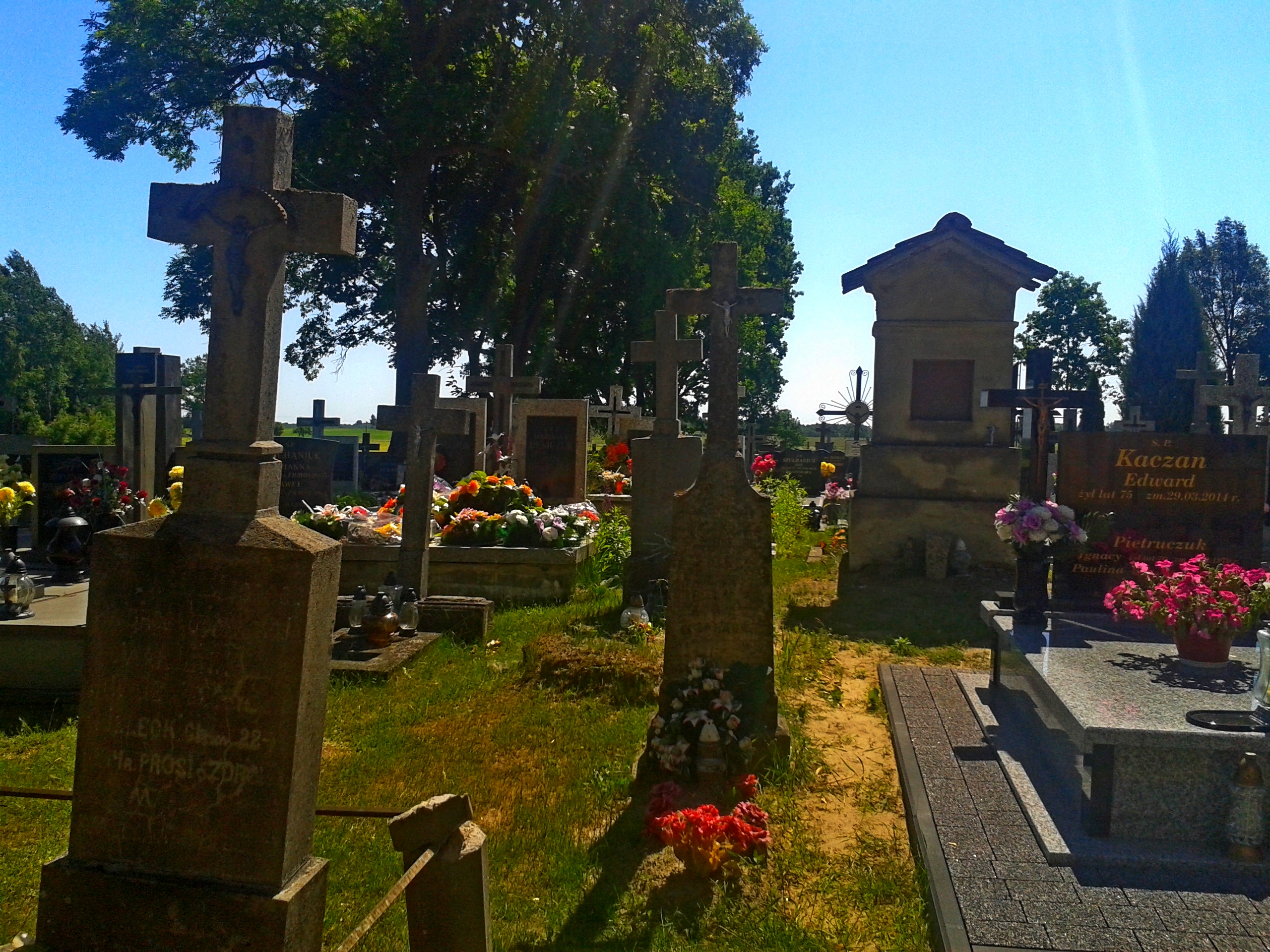 Cmentarz w Ortelu Królewskim, widok ogólny